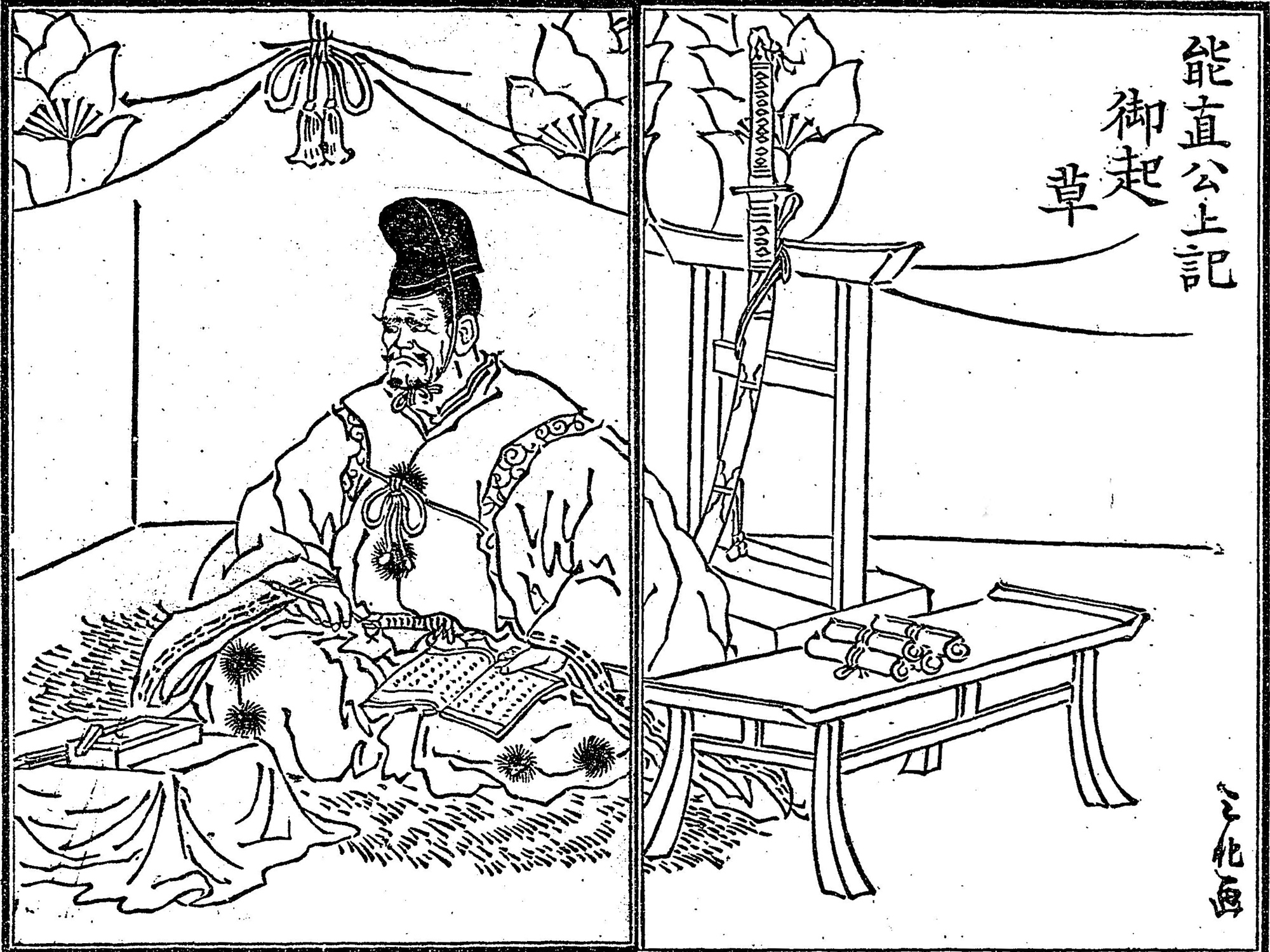 大友能直公御一代記 : 通俗絵入